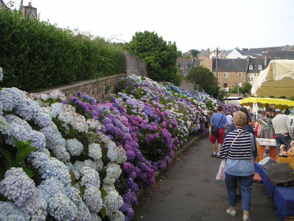 Eines der Wahrzeichen der Bretagne; große Hortensien-Büsche findet man dort an jeder Ecke oder wie hier selbst auf dem Markt in Perros-Guirec bei Lannion, Côtes-d'Armor (22)